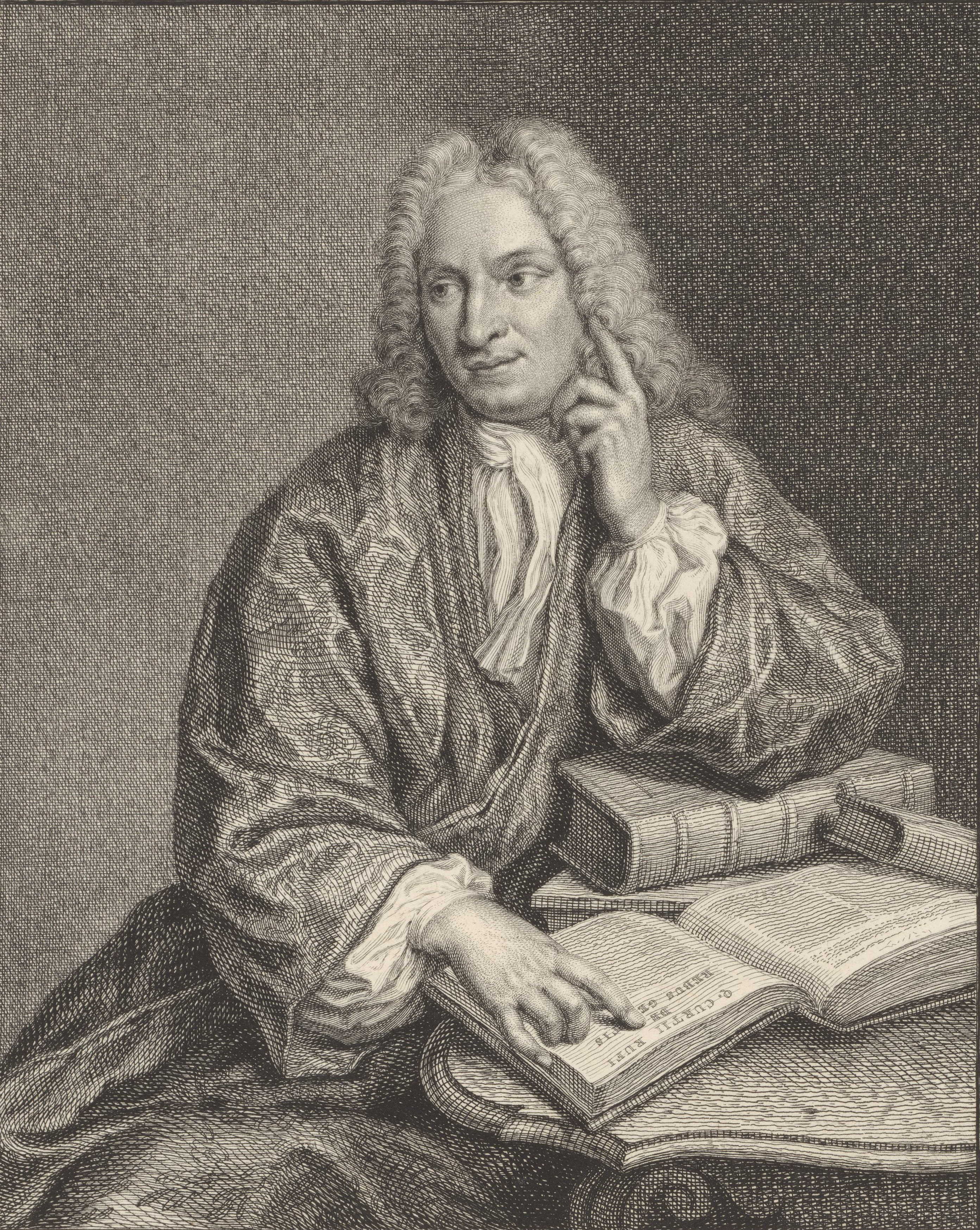 Kniestuk van Hendrik Snakenburg, zittend aan een tafel, waarop enkele boeken.